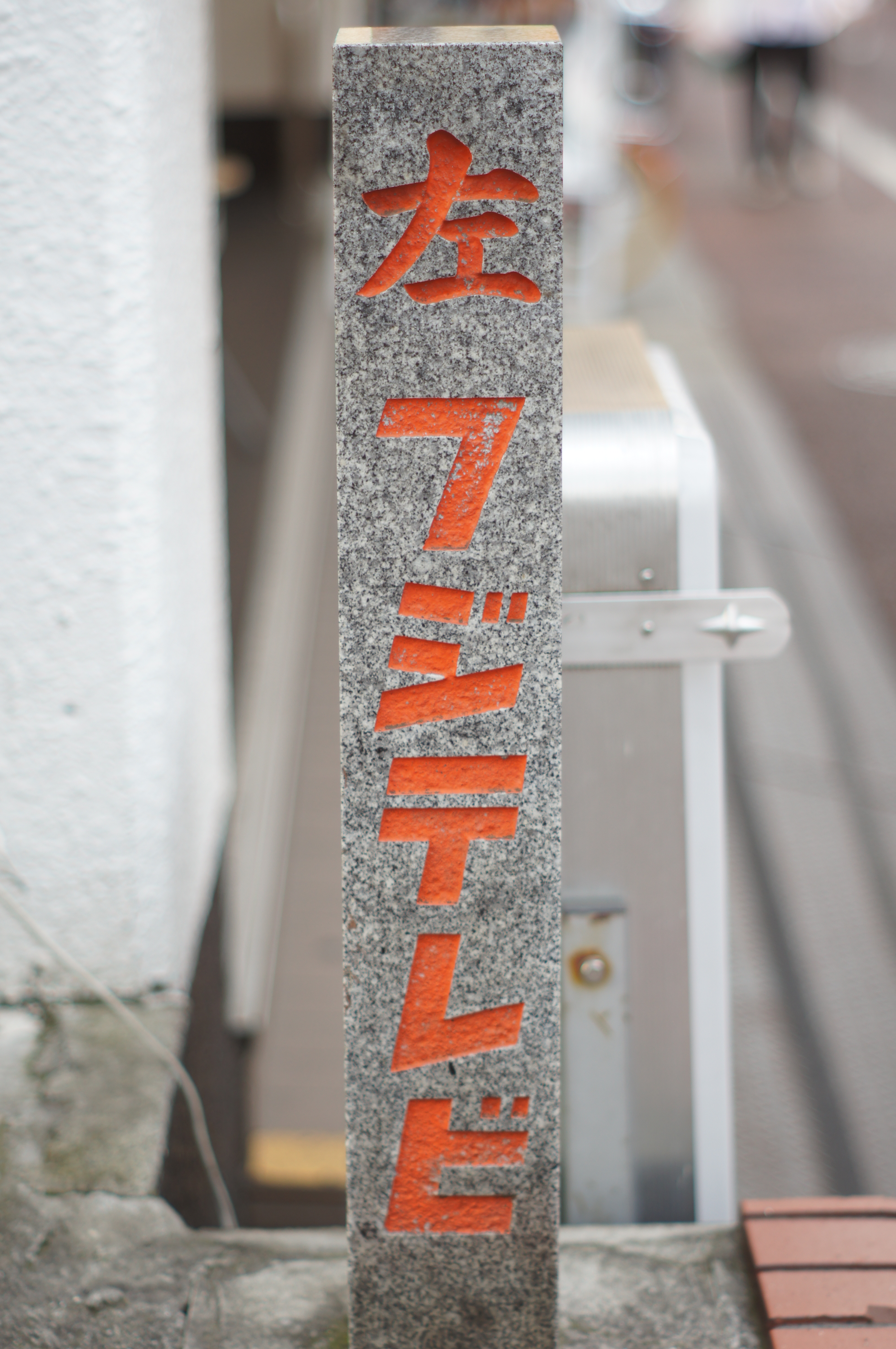 新宿区河田町のフジテレビ旧本社周辺で撮影。2011年現在も撤去されずに残っている案内板。